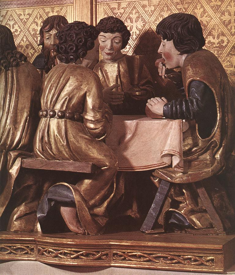 Skupina Poslednej večere z predely hlavného oltára